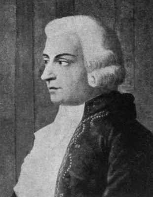 Giacomo Insanguine (1728-1795)